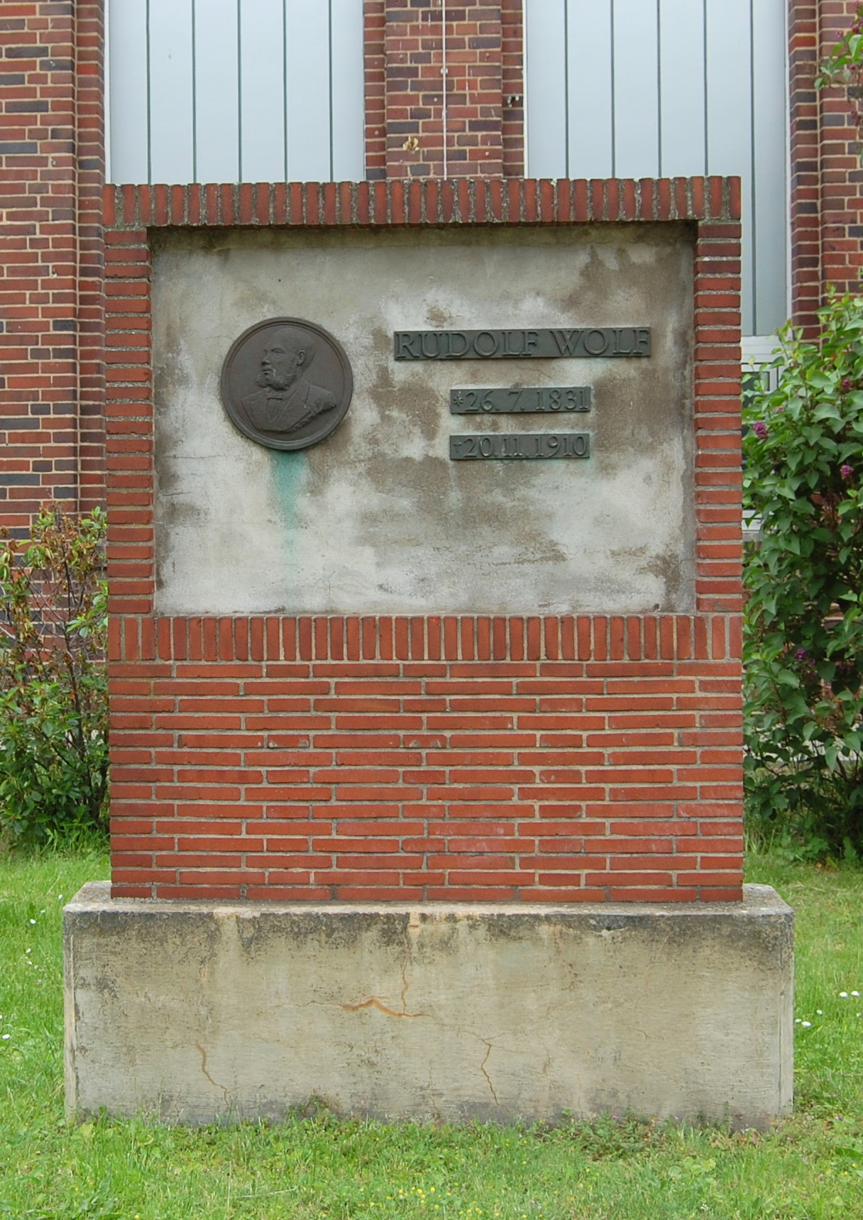 Denkmal für Rudolf Wolf auf dem SKL-Gelände in Magdeburg-Salbke